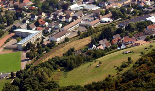 Luftaufnahme von Altenglan, mit Sportplatz und Schule.